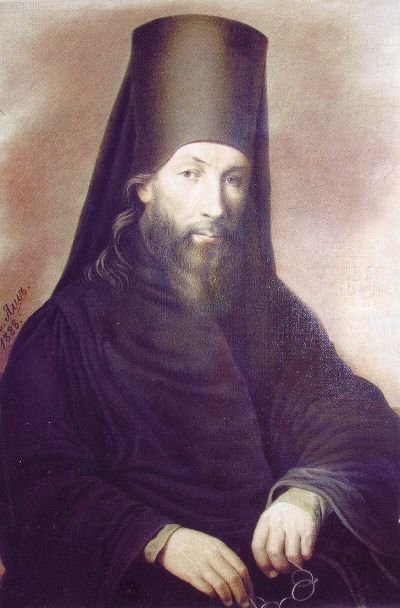 Портрет архимандрита Иакинфа - в миру Никиты Яковлевича Бичурина (1777 - 1853)